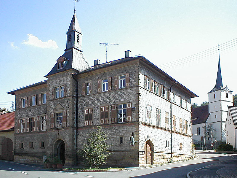 Rathaus in Adelsheim-Sennfeld